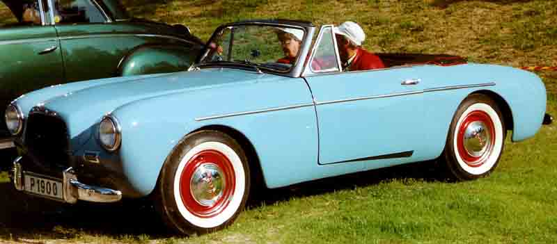 Volvo P1900 Sport Cabriolet 1956